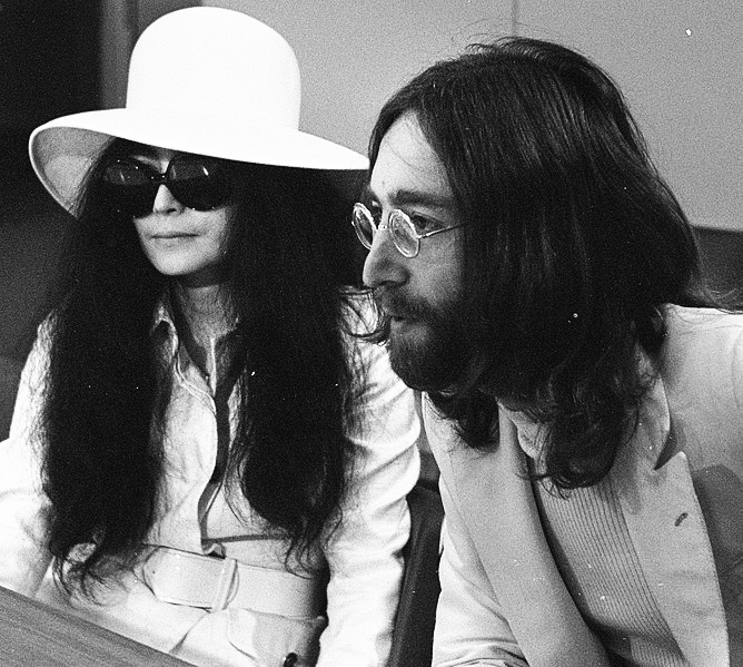 Collectie / Archief : Fotocollectie Anefo Reportage / Serie : [ onbekend ] Beschrijving : John Lennon en echtgenote Yoko Ono vertrekken van Schiphol naar Wenen in de vertrekhal Datum : 31 maart 1969 Locatie : Noord-Holland, Schiphol Trefwoorden : aankomst en vertrek, echtparen, musici, vliegvelden Persoonsnaam : Lennon, John, Ono, Yoko Fotograaf : Evers, Joost / Anefo Auteursrechthebbende : Nationaal Archief Materiaalsoort : Negatief (zwart/wit) Nummer archiefinventaris : bekijk toegang 2.24.01.05 Bestanddeelnummer : 922-2496